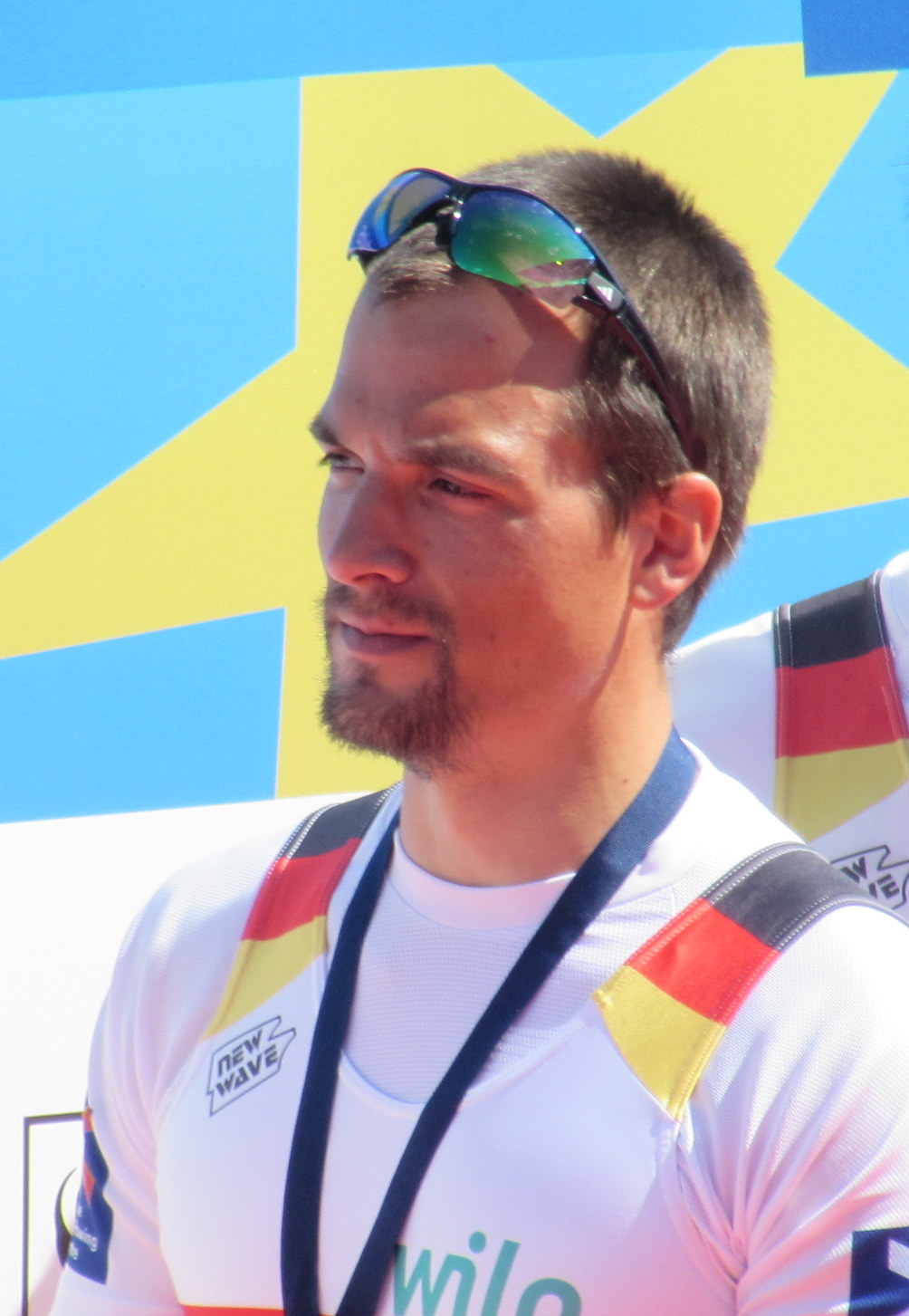 Maximilian Reinelt, Ruder-EM 2016